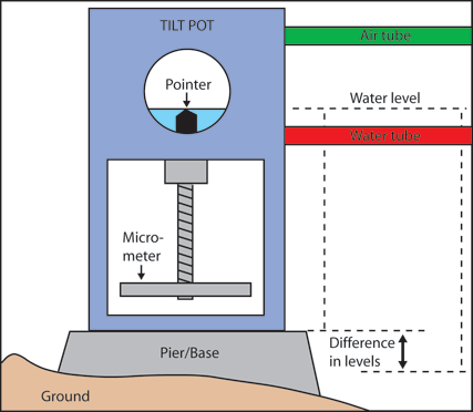 Schéma représentant la structure et le fonctionnement interne d'un tiltmètre